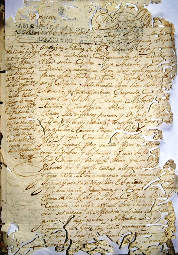 Primera página del testamento de Antonio Hugo de Omerique, conservado en el Archivo Histórico Provincial de Cádiz y sacado a la luz en 2016.